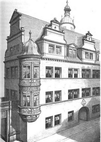 Abgebildet ist ein typisches Gebäude der Renaissancezeit in Leipzig. Hier das so genannte Fürstenhaus.